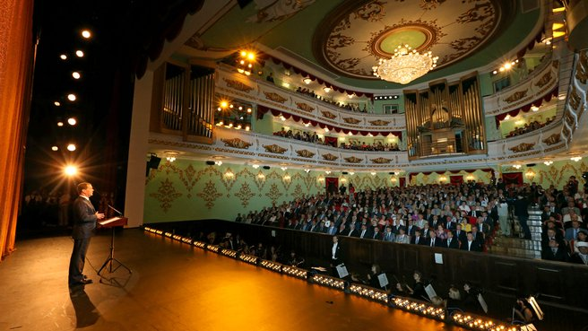 Выступление на концерте по случаю открытия нового здания Марийского государственного театра оперы и балета имени Эрика Сапаева